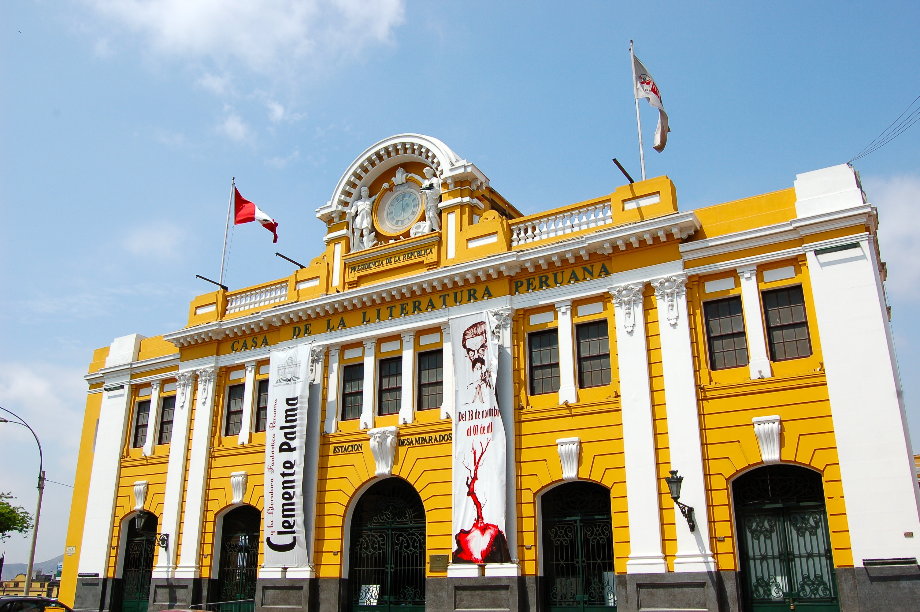 Casa de la Literatura Peruana